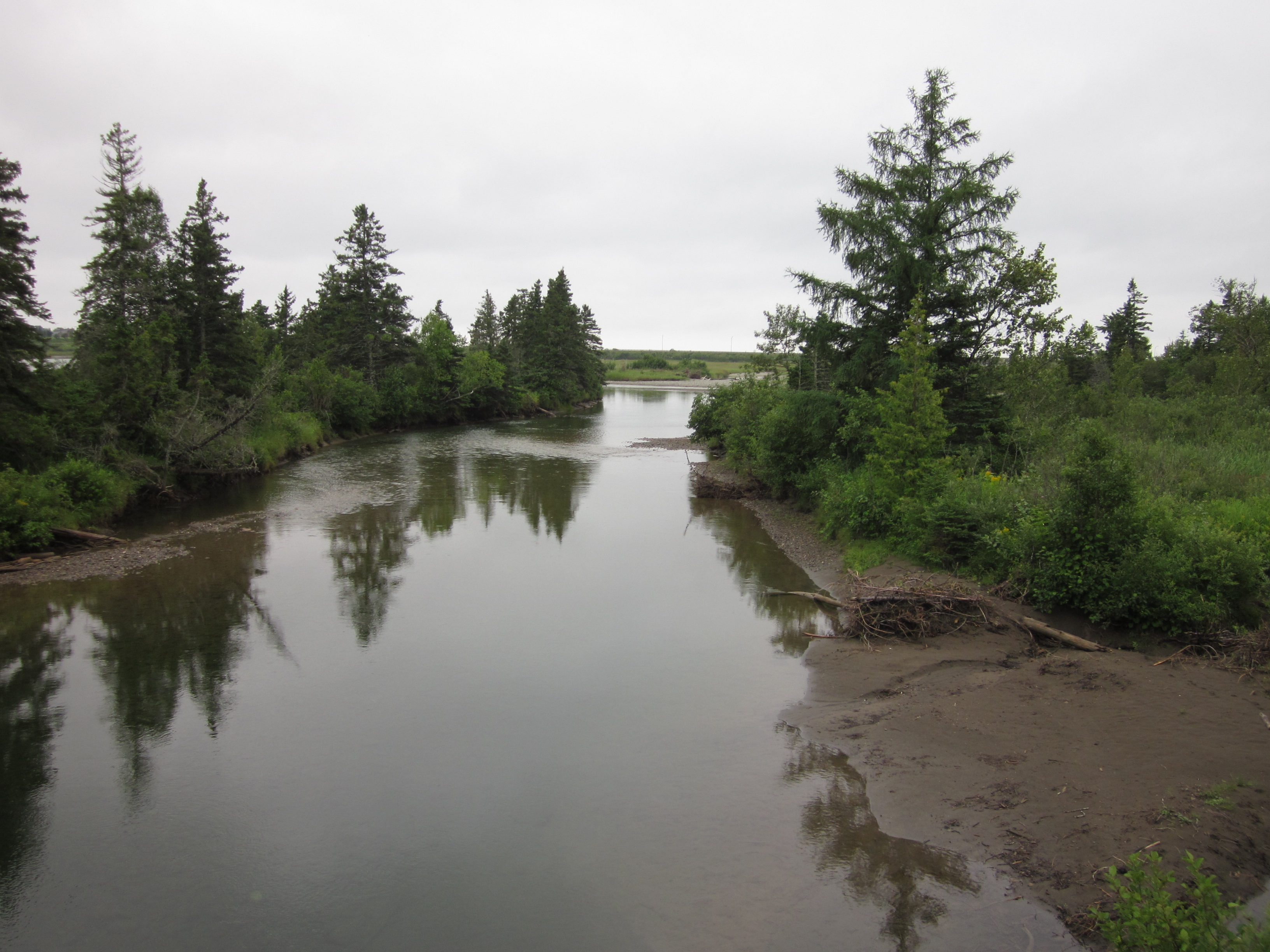 Rivière Bonaventure dans la réserve aquatique de l'Estuaire-de-la-Rivière-Bonaventure